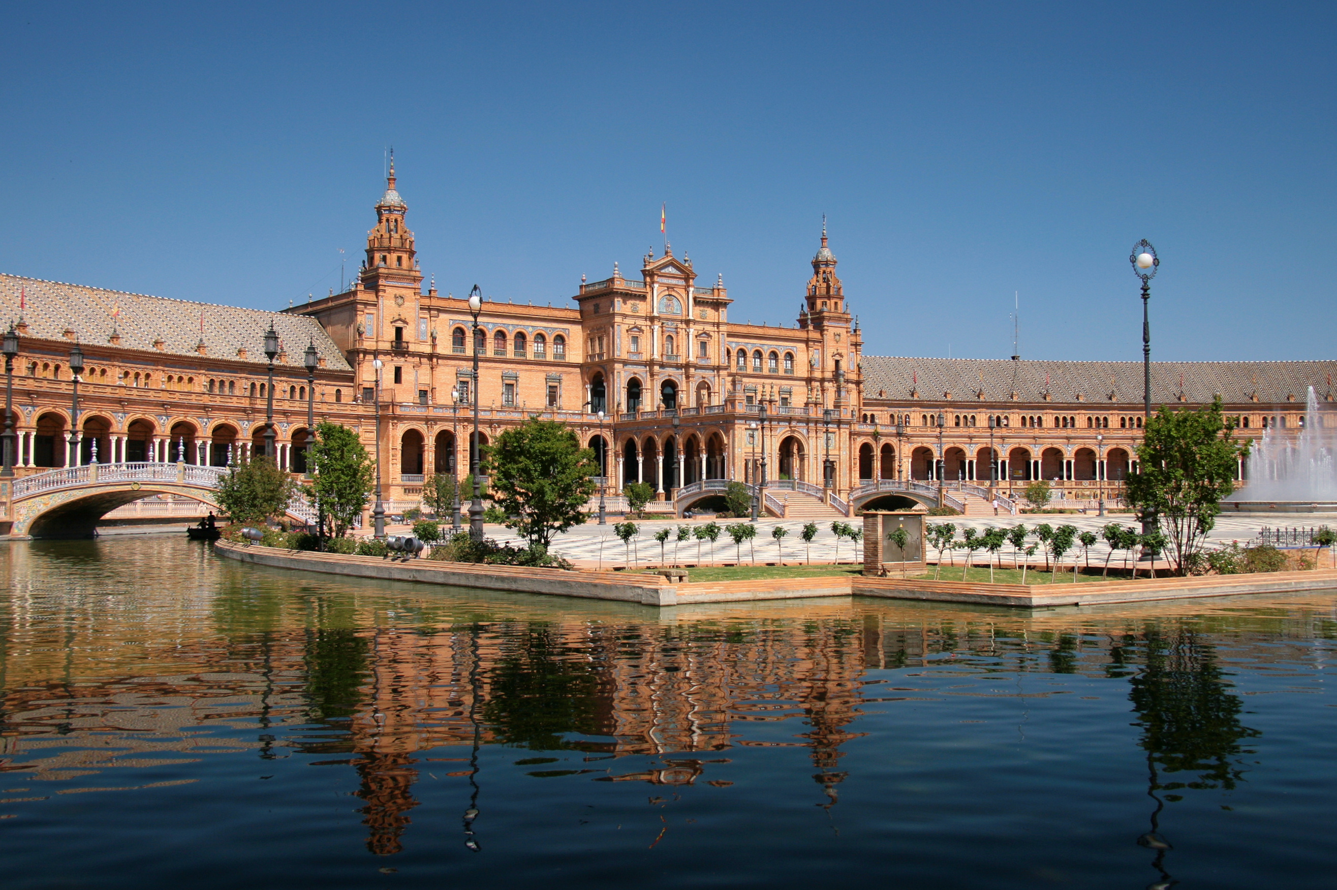 Plaza de España, Sevilla, España